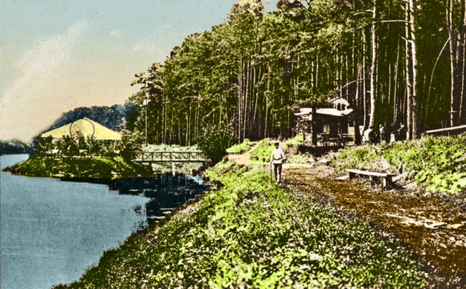 Ставок. Святошинські дачі